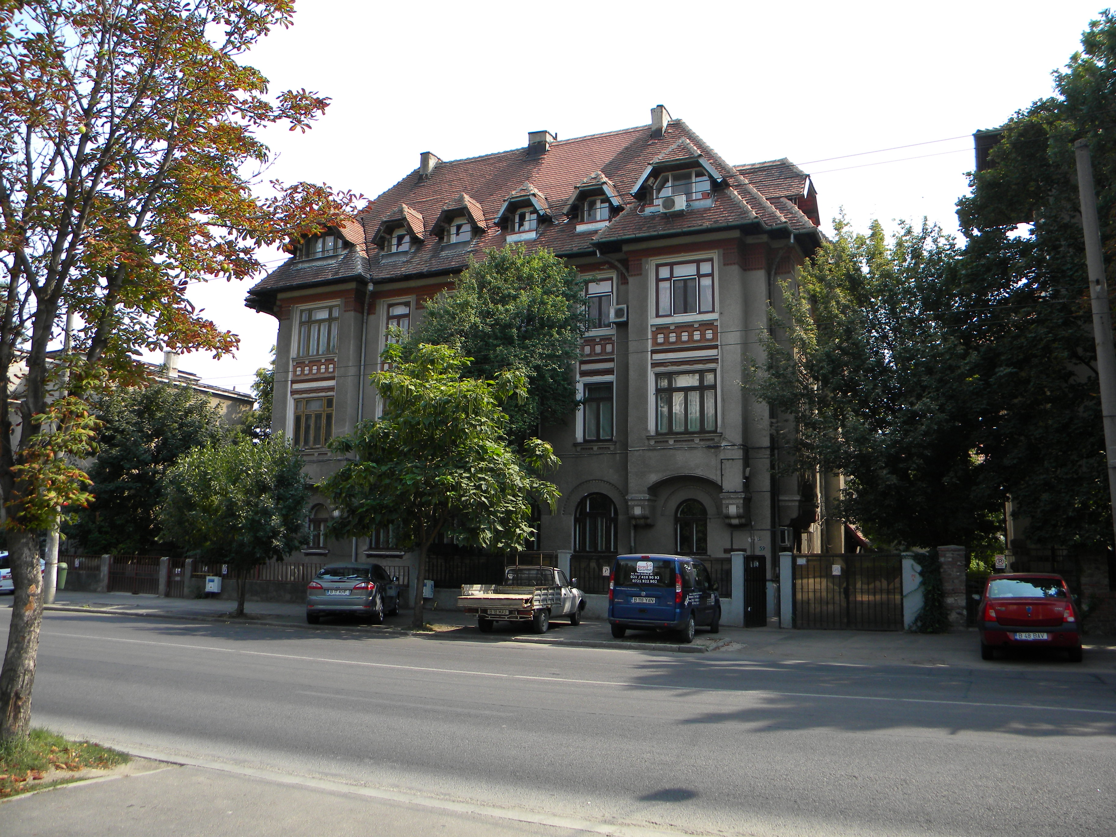 Casa nr. 59 pe Str. Eroii Sanitari, Bucuresti sect 5